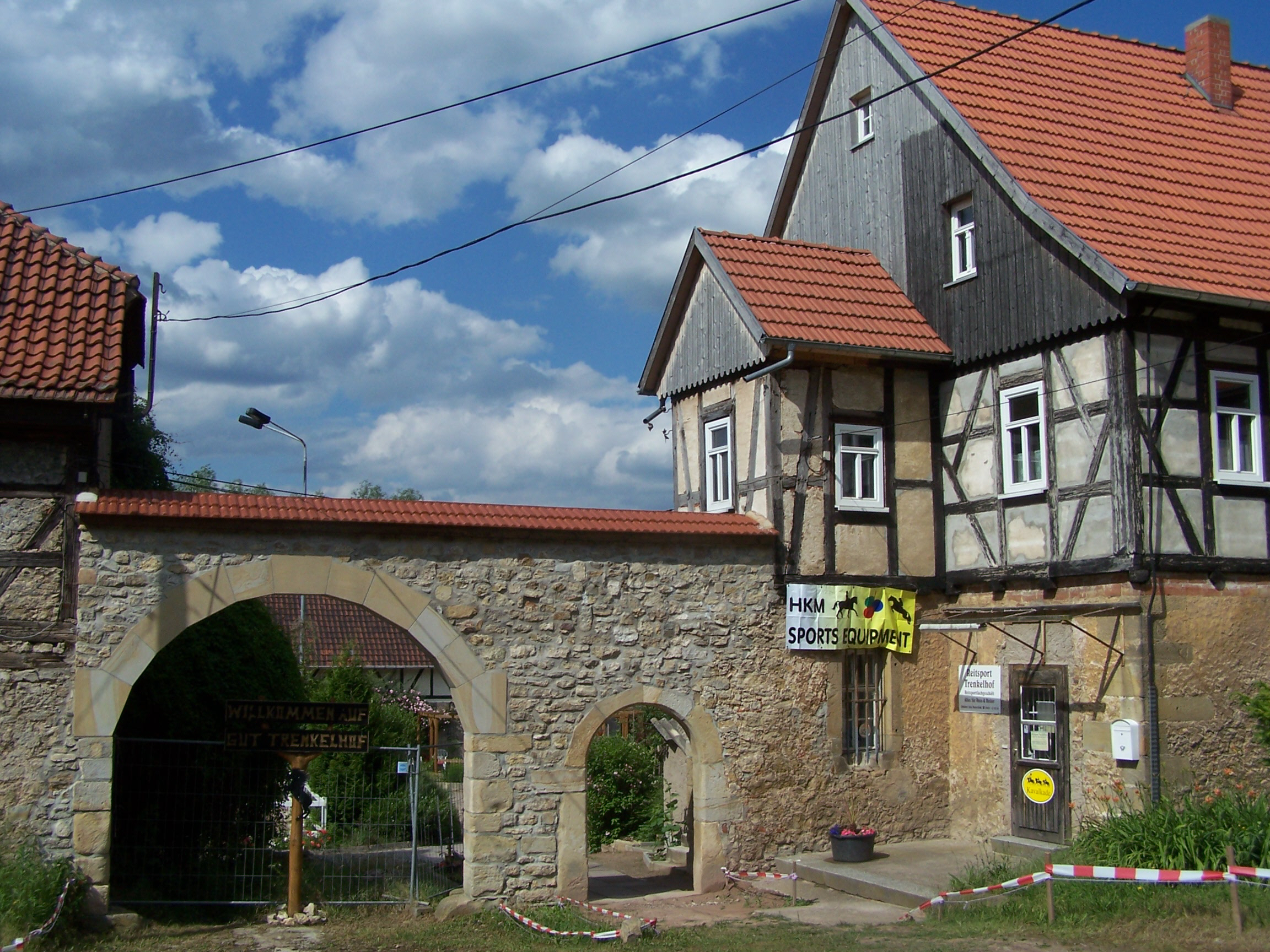 Das Hauptportal am Gut Trenkelhof nach der Sanierung. Ansicht von Süden.